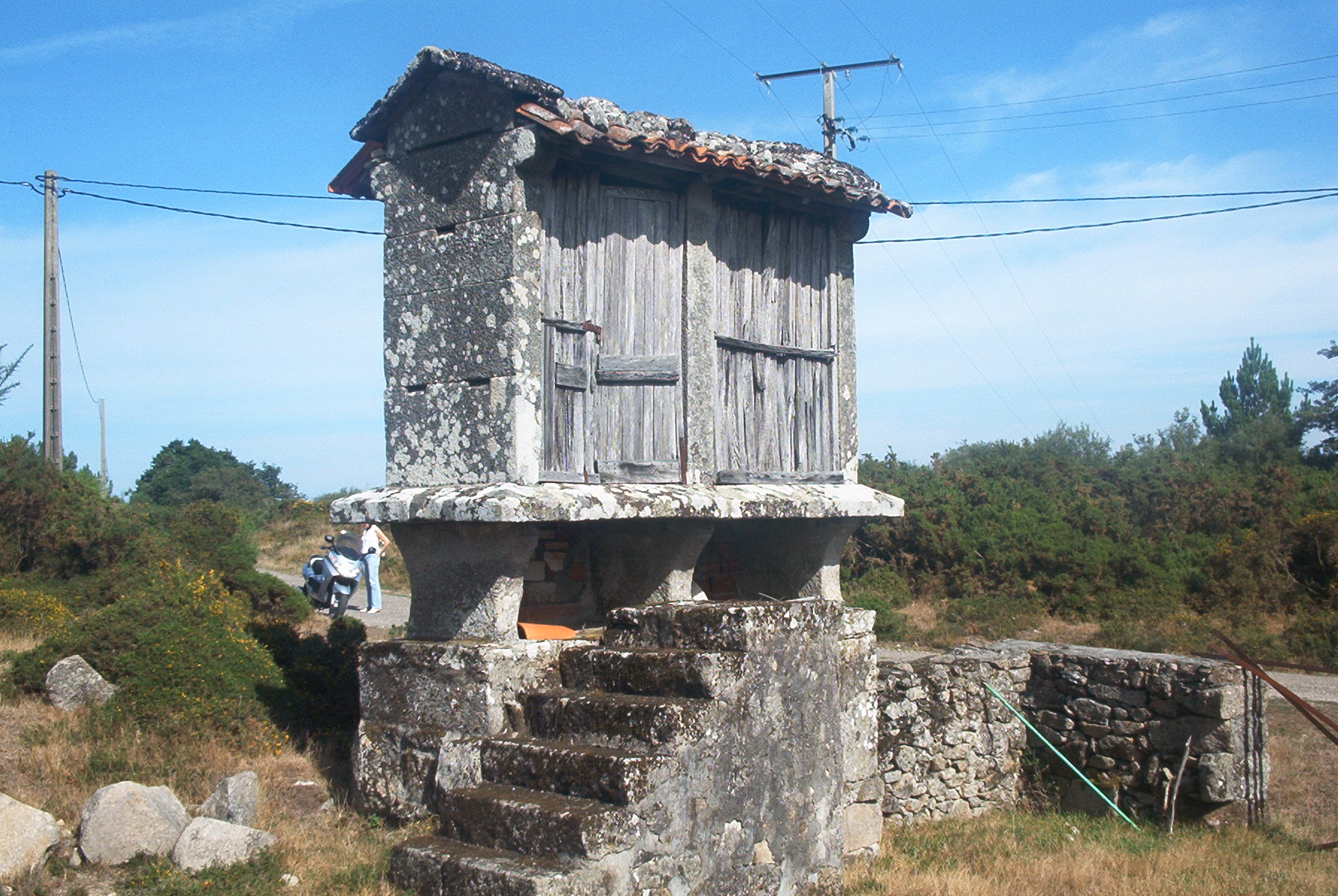 Hórreo en San Martiño do Carrasco (Antas de Ulla)